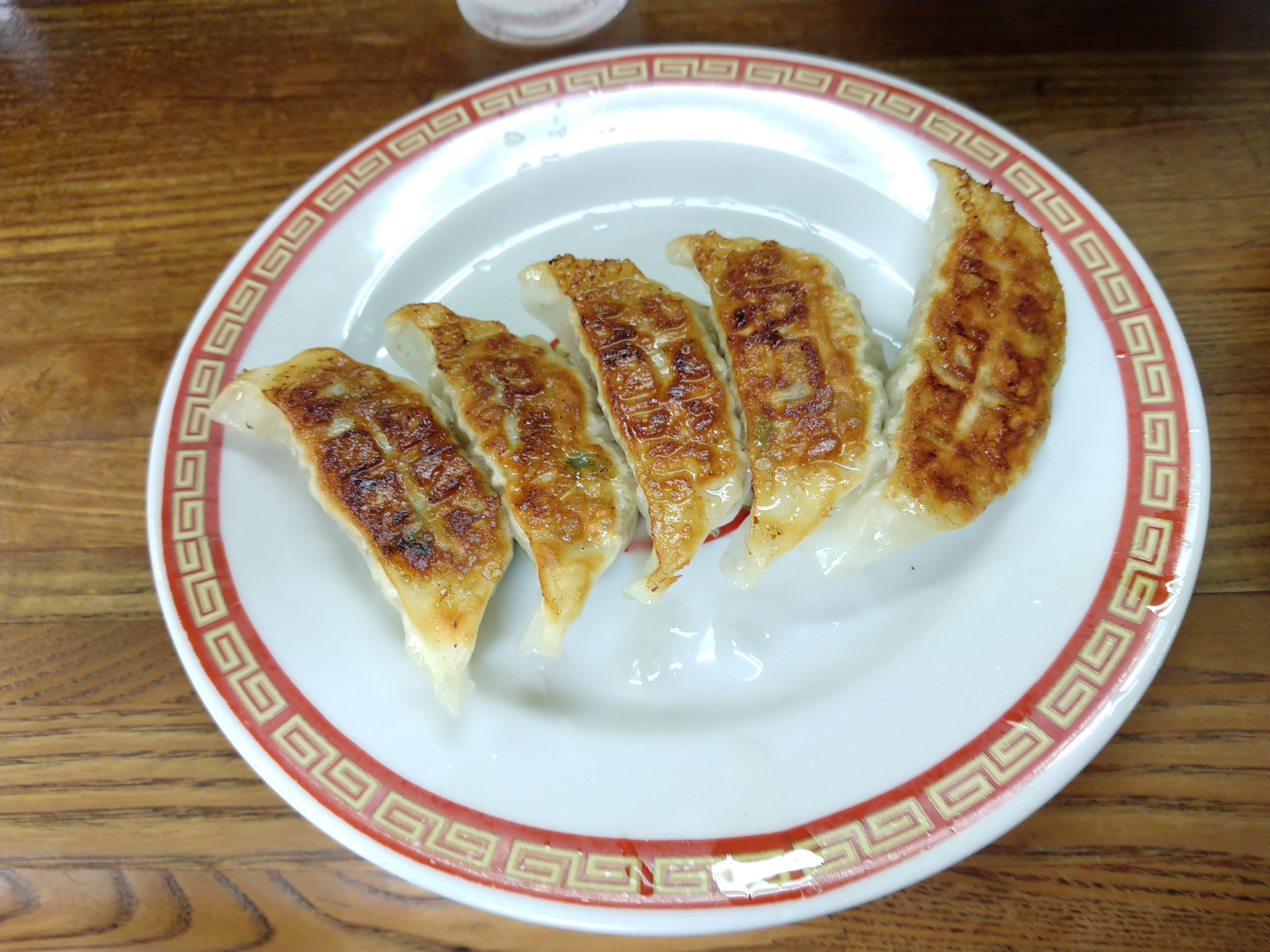 餃子5つ。